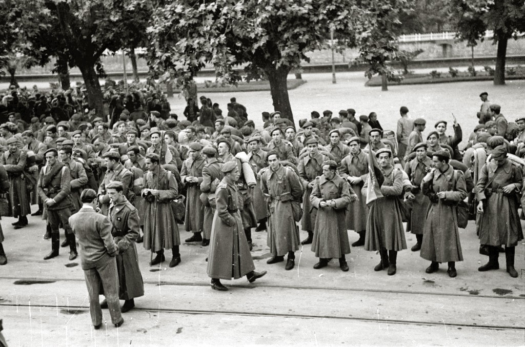 Título original: Despedida a los soldados integrantes de la División Azul tras una comida en el patio del Hospital Militar Mola antes de partir (10/20) Localización: San Sebastián (Guipúzcoa)